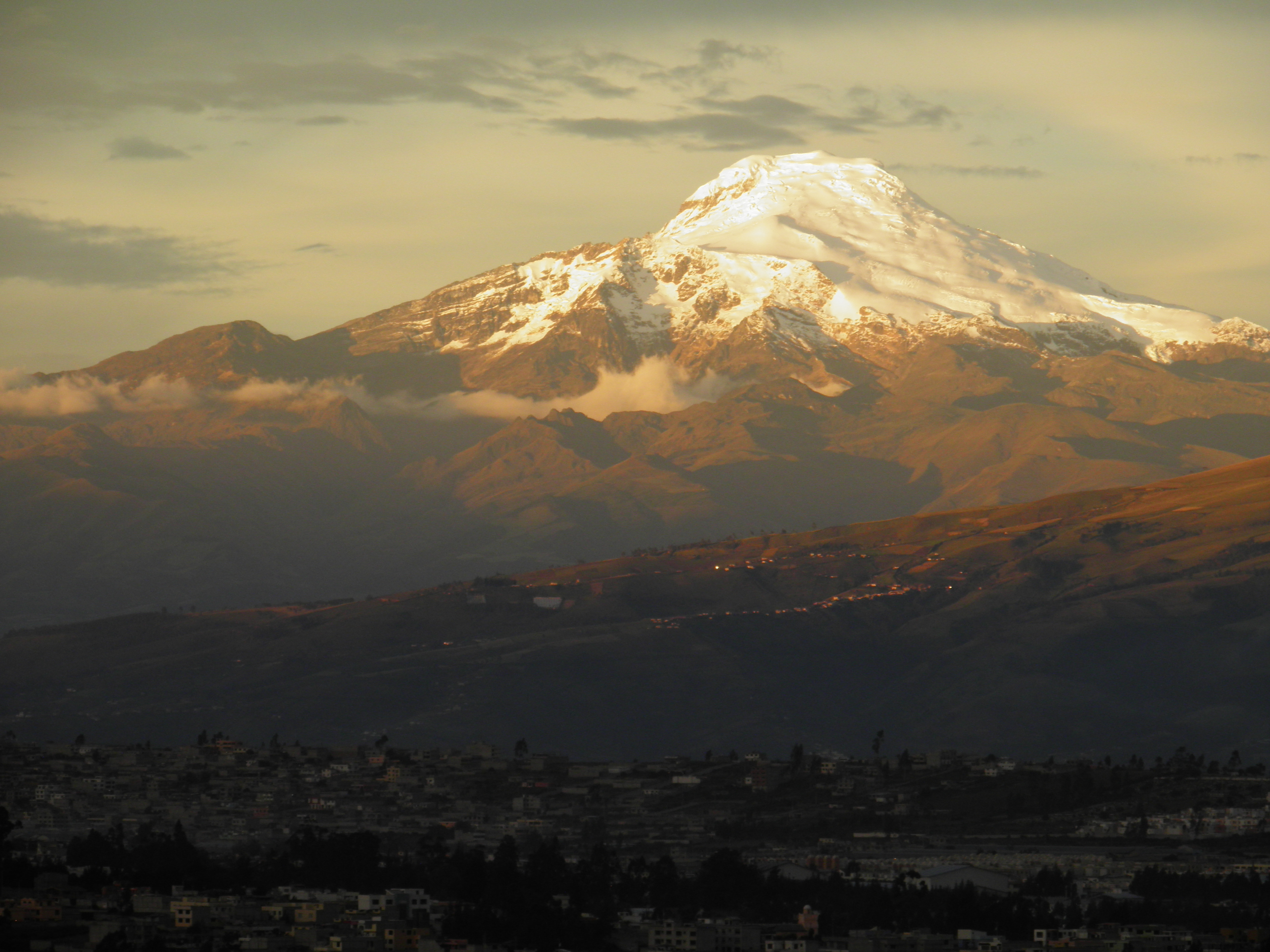 The volcano Cayambe (4690 m) and the northern outskirts of Quito, Ecuador - El volcán Cayambe (4690 m) y los barrios en el extremo norte de la ciudad de Quito, Ecuador